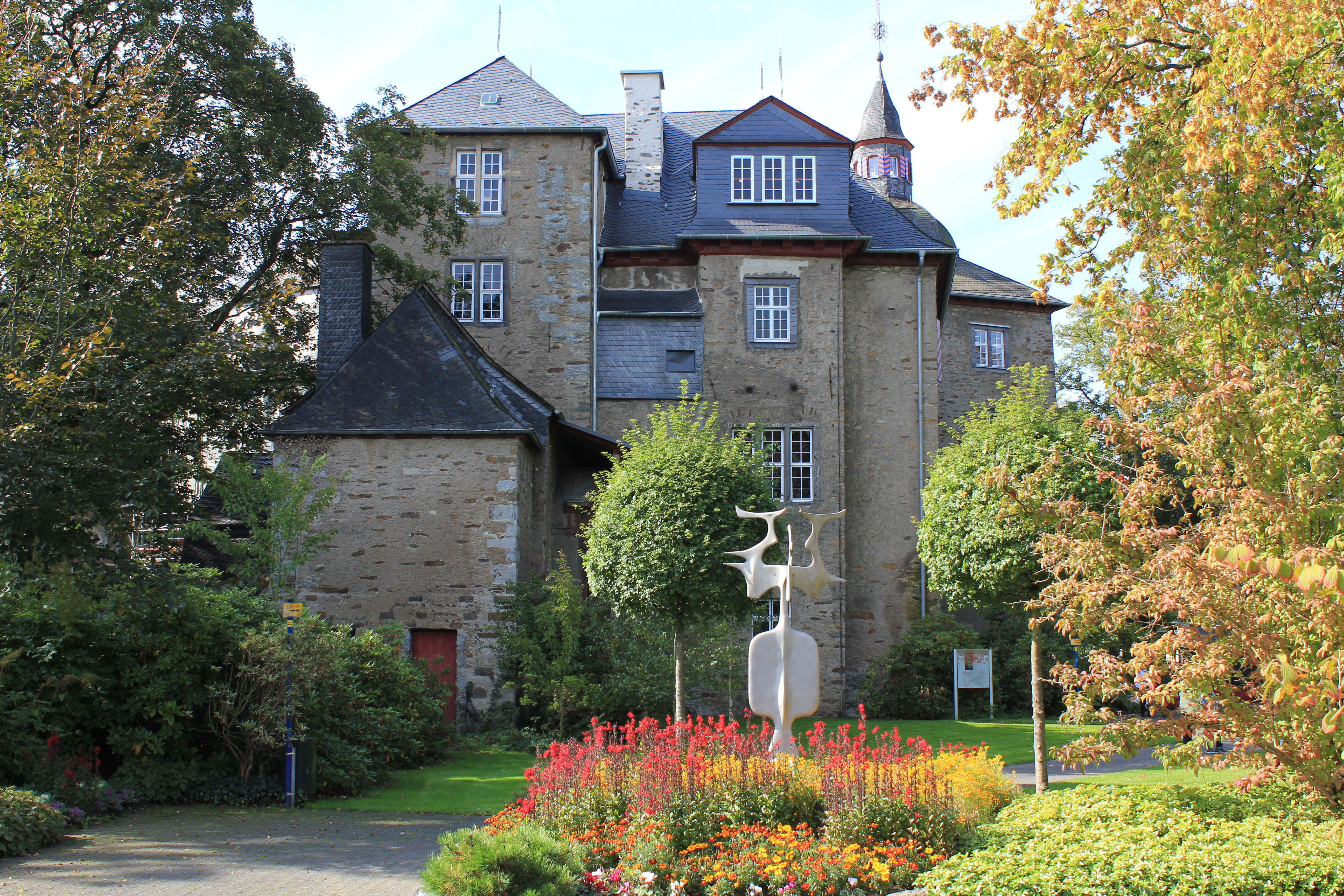 Oberes Schloss in Siegen